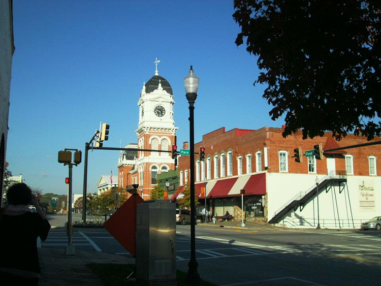 Mystic Falls, Virgina. Ciudad real, basada en la novela/serie de televisión The Vampires Diaries (Crónicas Vampiricas). Donde viven desde hace 1000 años vampiros y hombres lobo.